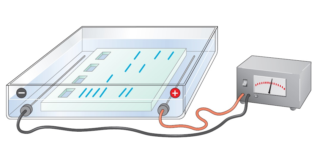 Elettroforesi del diagarosio